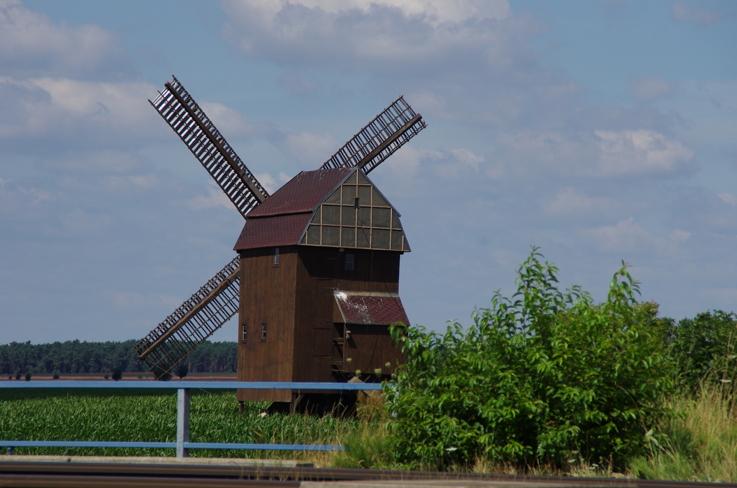 Niedergörsdorf in Brandenburg. Die Mühle in Mellndorf steht unter Denkmalschutz. Sie ist für Schulzwecke noch in Betrieb.